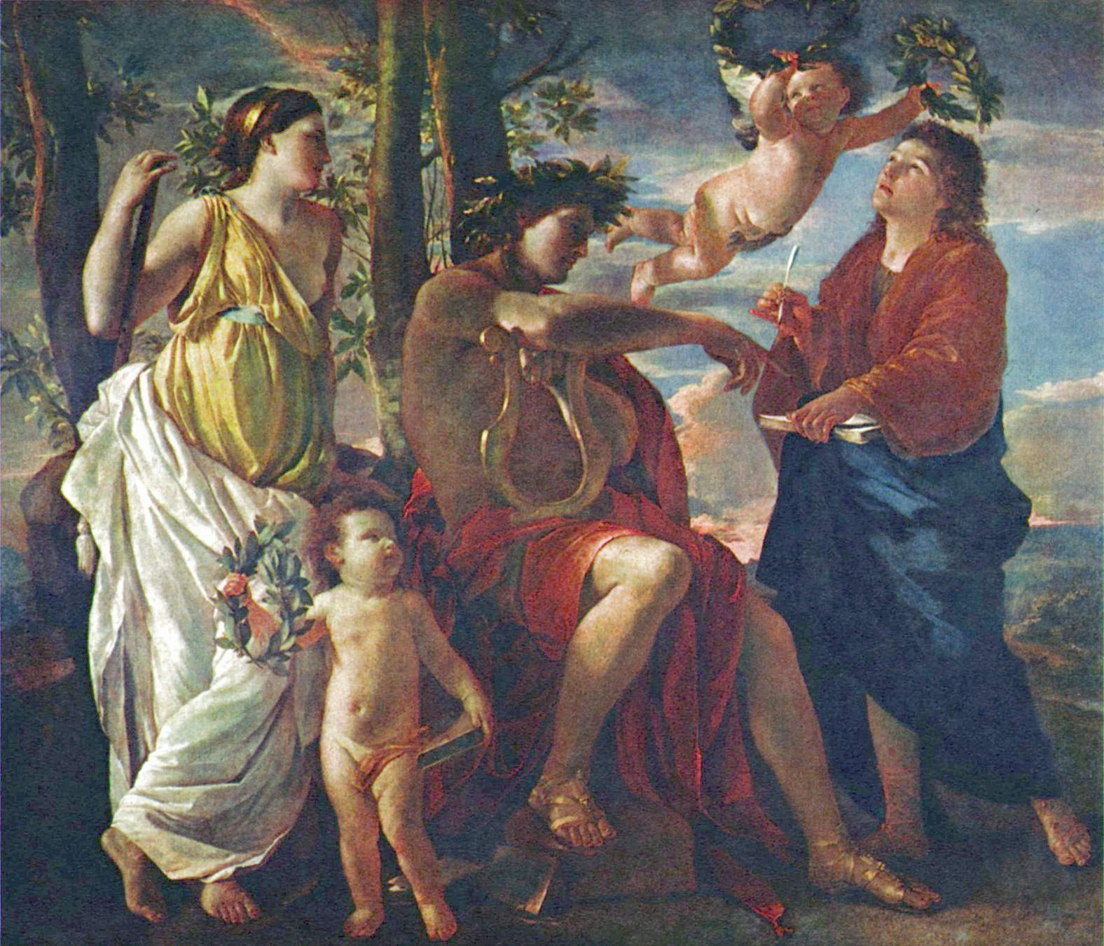 Le jeune homme de droite écrivant sous l'inspiration d'Apollon est peut-être Virgile : la femme debout, à gauche, serait Calliope, Muse de l'éloquence et de la poésie héroïque. Le tableau pourrait avoir été peint en l'honneur d'un poète contemporain ou récemment disparu.